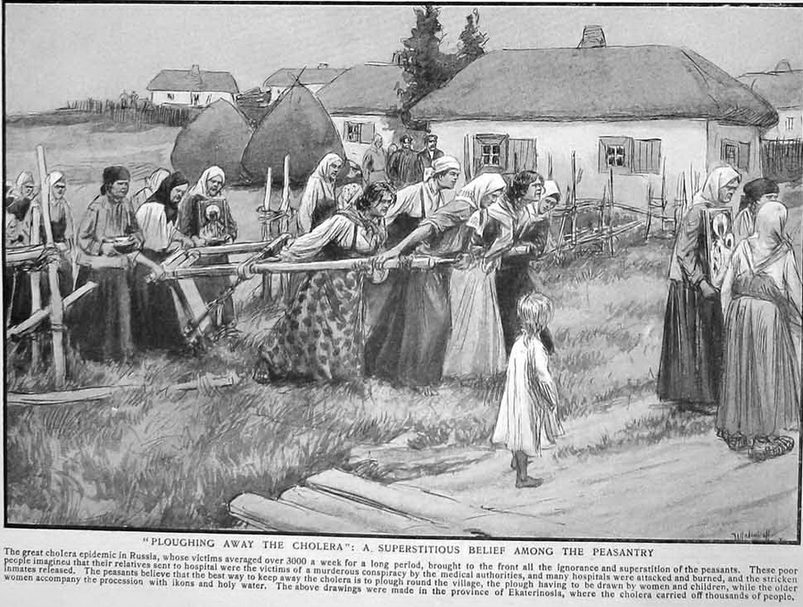 "Выпахивание" холеры во время эпидемии. Окрестности Екатеринославля. XIX век